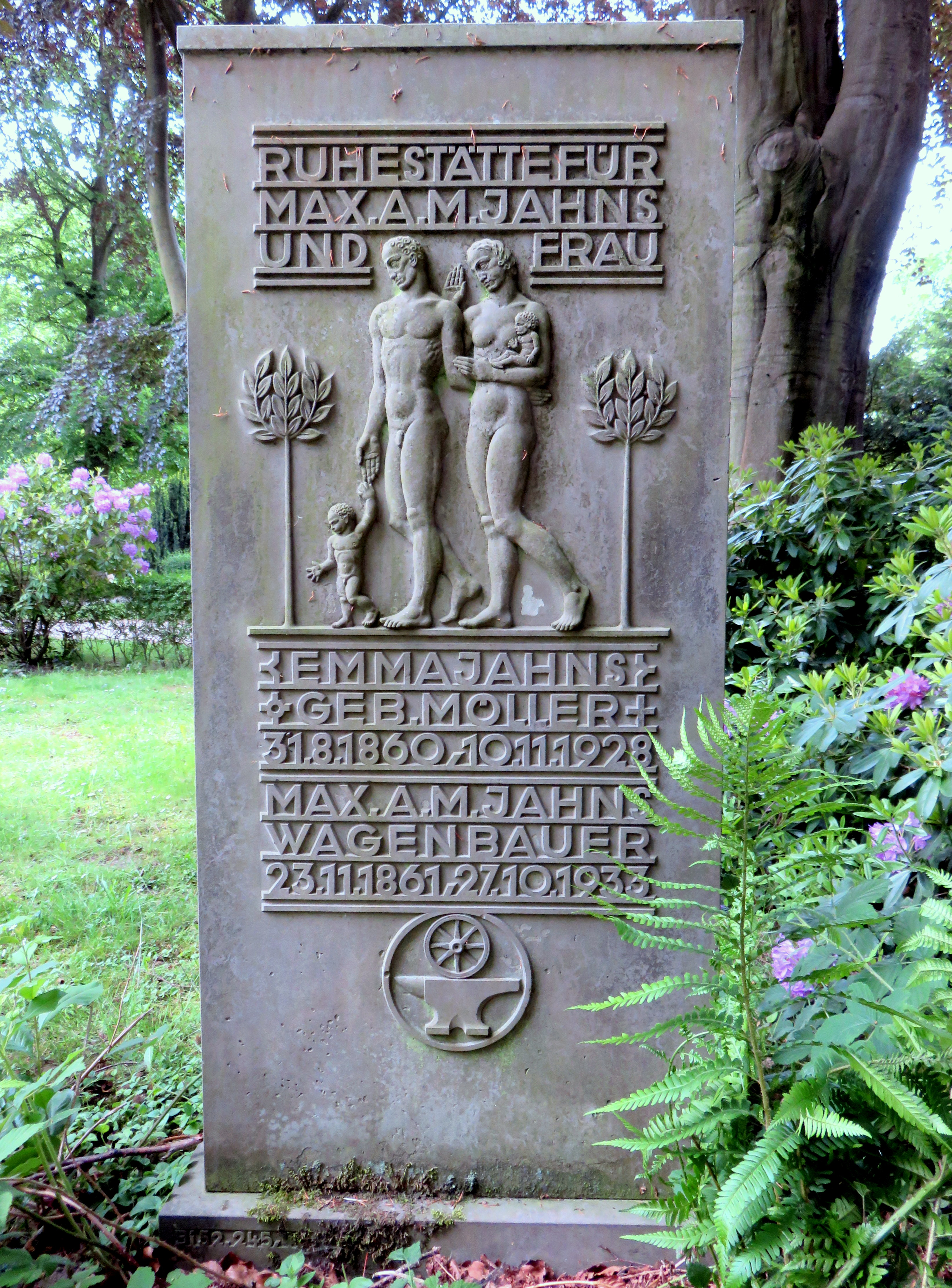 Grabstein für den deutschen Maler Max Jahns, seine Ehefrau sowie seine Eltern (Beruf:Wagenbauer) auf dem Hamburger Friedhof Ohlsdorf, Planquadrat Bi 52, 245-6 (nordöstlich Kapelle 10), errichtet 1928 anlässlich des Todes der Mutter.